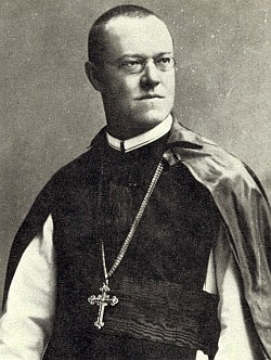 Bruno Josef Pammer (1866 - 1924), Opat kláštera ve Vyšším Brodě .